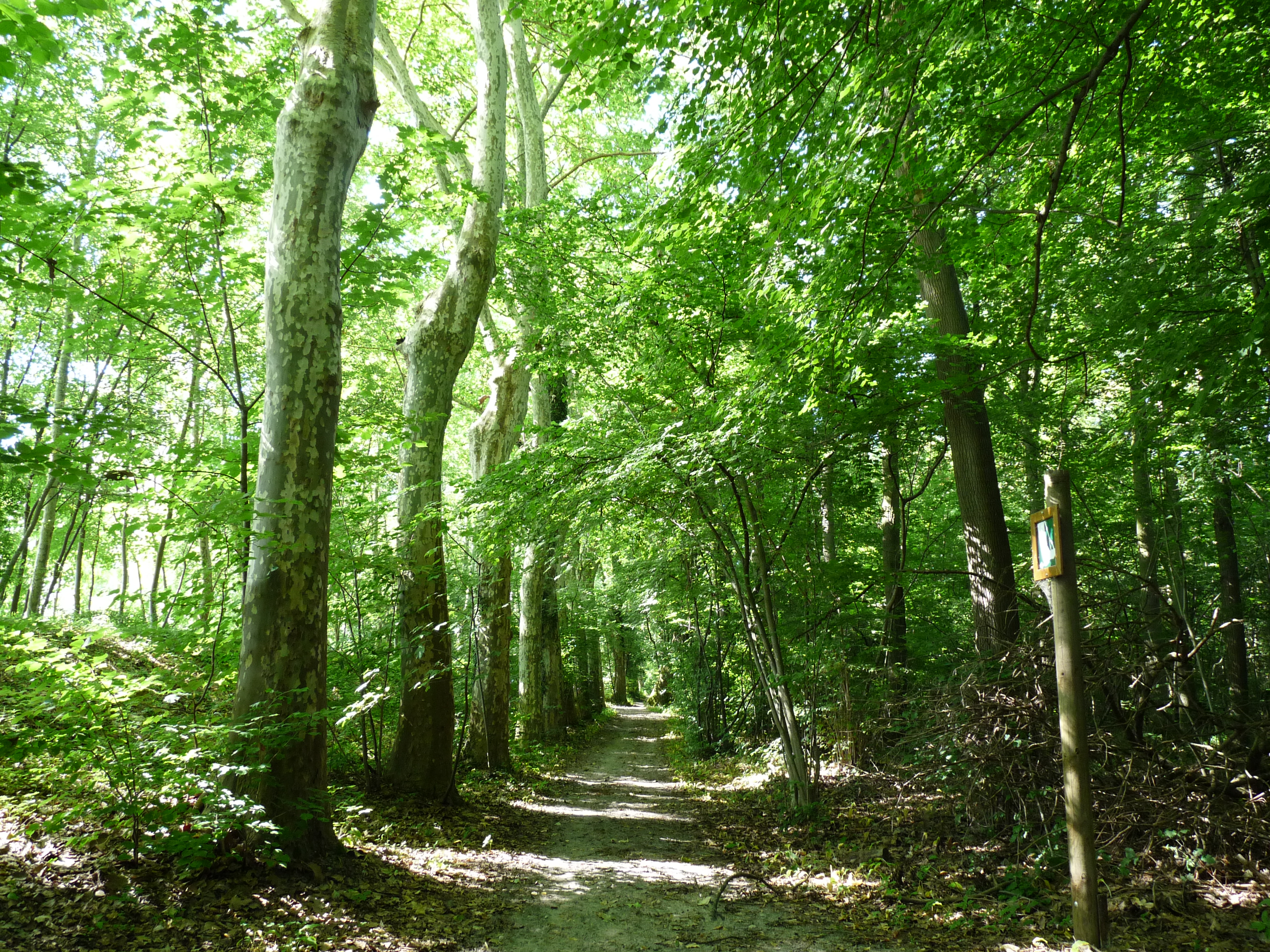 Piste cavalière dans la forêt de la Robertsau, au nord de Strasbourg